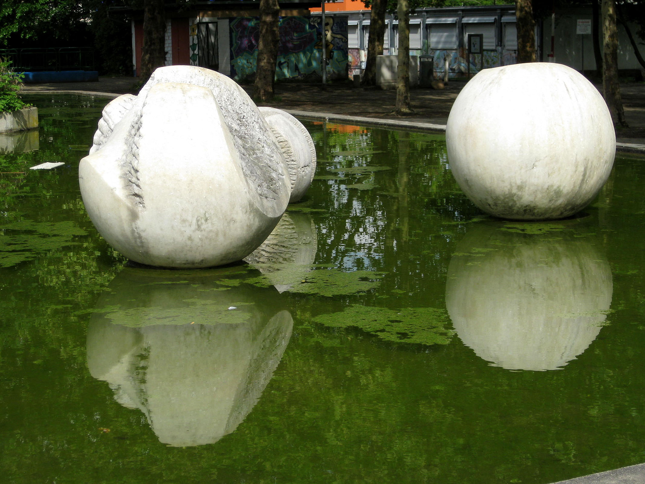 Hans-Günther van Look, Raumklänge, 1969/70, - Deutschland, Baden-Württemberg, Freiburg im Breisgau, vor der Albert-Schweitzer-Schule